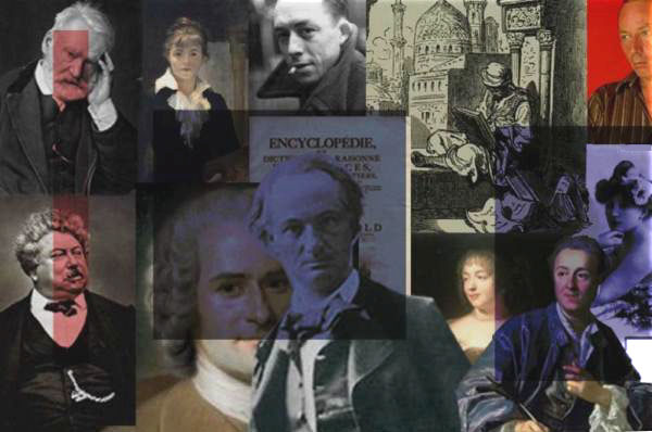 Composition (personnelle) sur la littérature francophone à partir d'images disponibles sur Wikipedia (domaine public ou libres de droits)